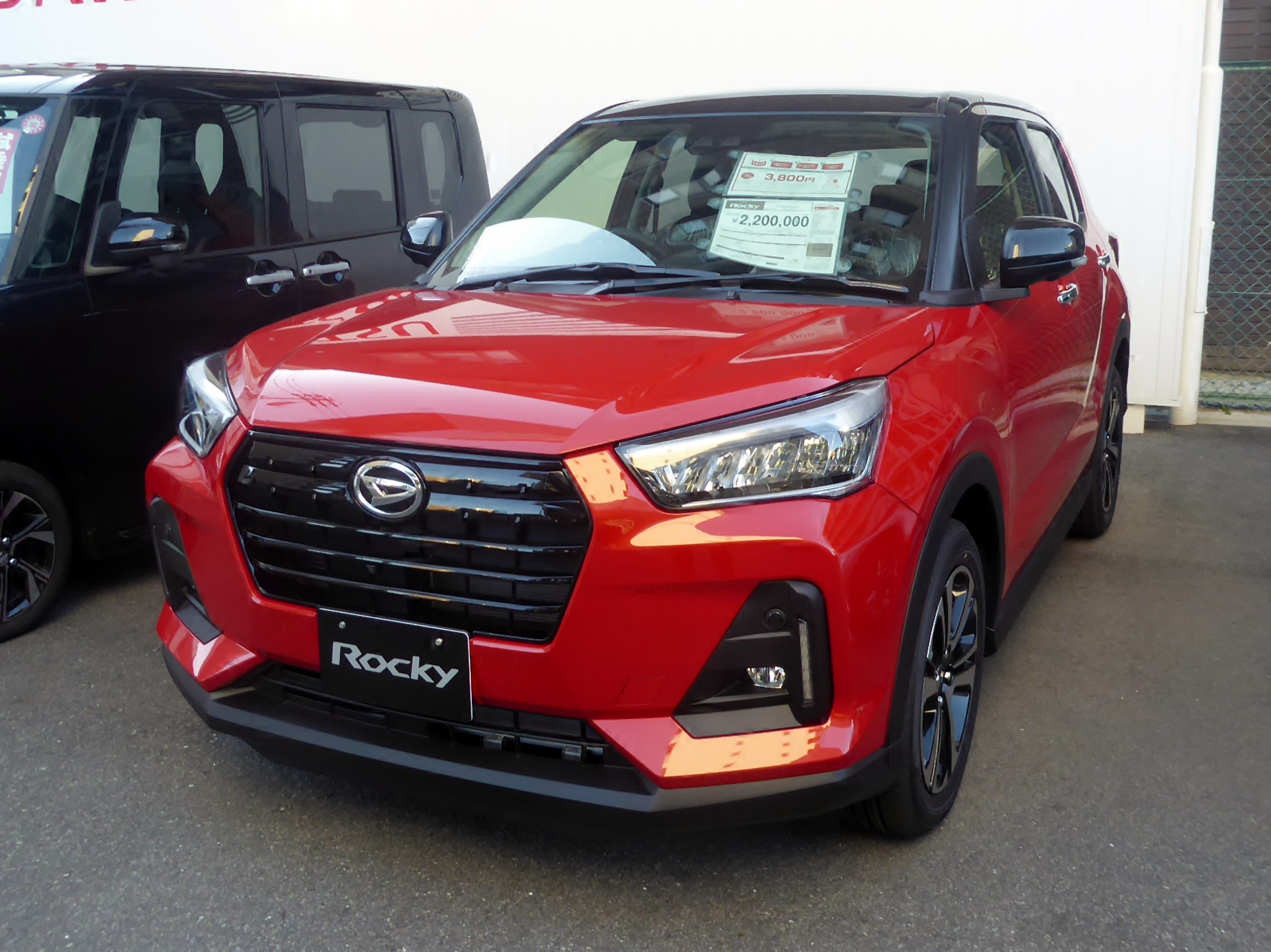 5BA-A200S-GBVV型ダイハツ・ロッキーPremium 2WDをフロントから撮影。